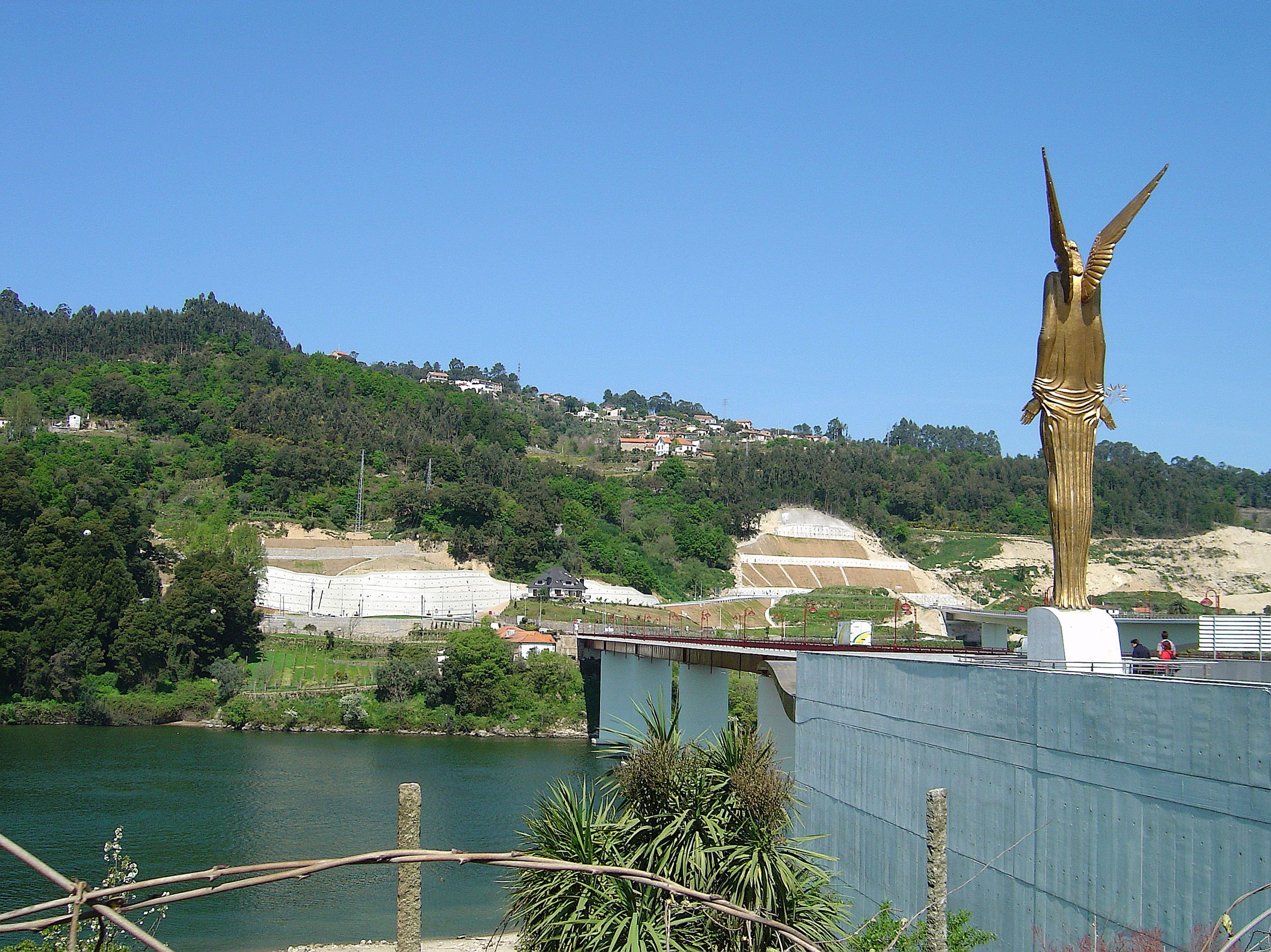 Memorial da Tragédia de Entre-os-Rios - Castelo de Paiva Fotografia de Vitor Oliveira, integrada na colecção com o endereço